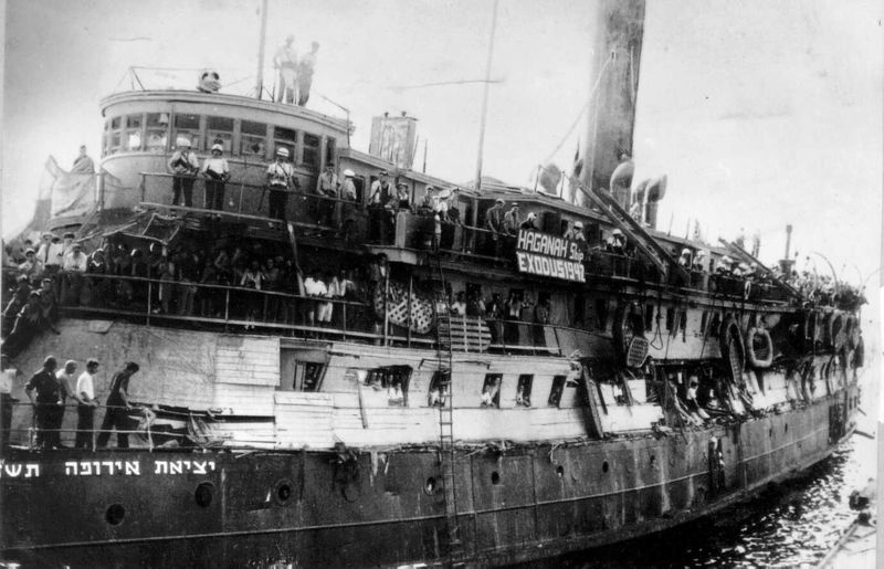 "Исход"